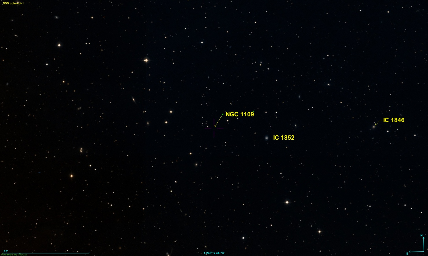 Image créée à l'aide du logiciel Aladin Sky Atlas du Centre de Données astronomiques de Strasbourg et des données de DSS (Digitized Sky Survey).